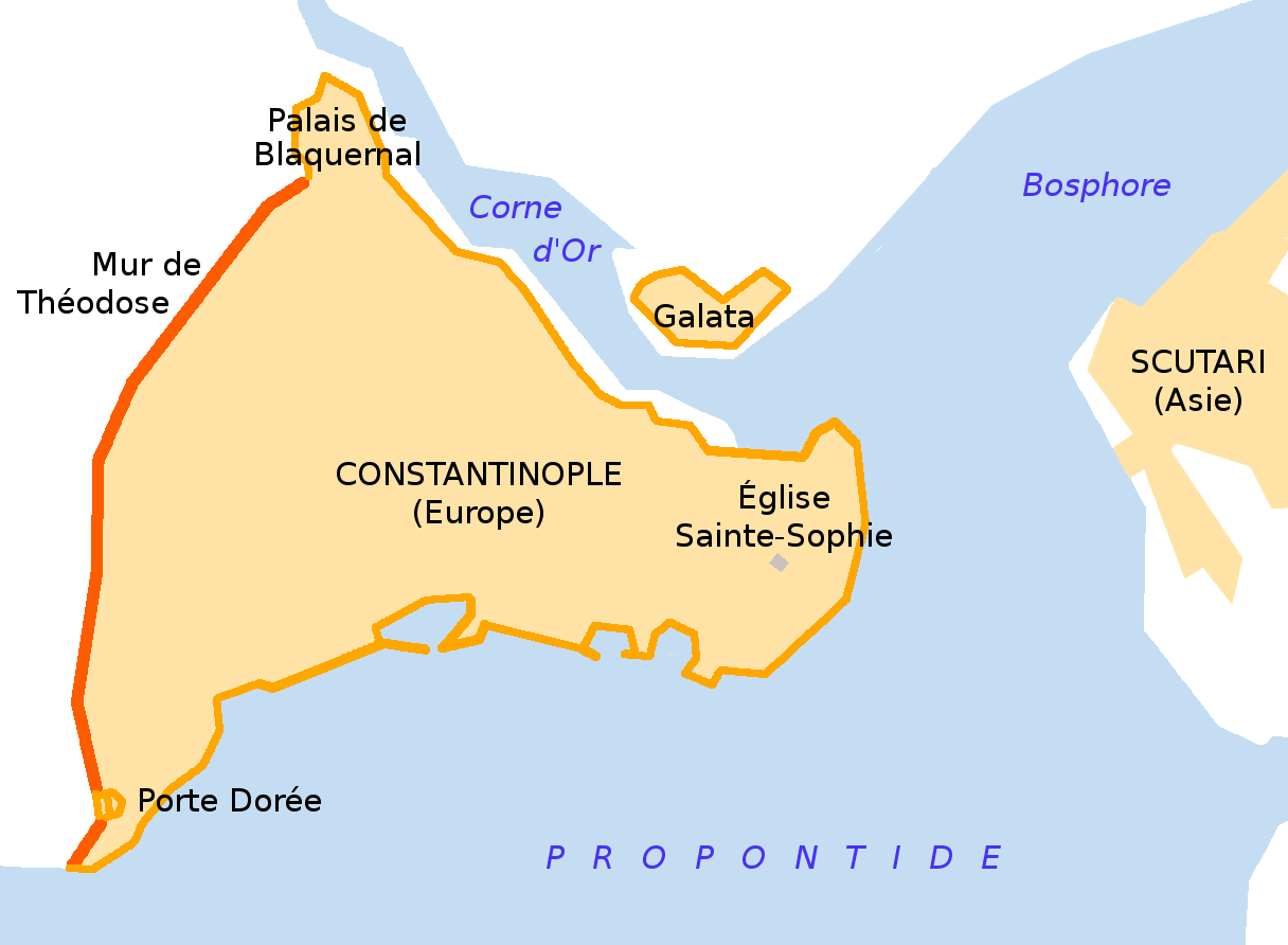 Constantinople et Scutari dans le roman de Walter Scott Robert comte de Paris, qui se situe à l'arrivée des barons de la première croisade (fin 1096-début 1097).